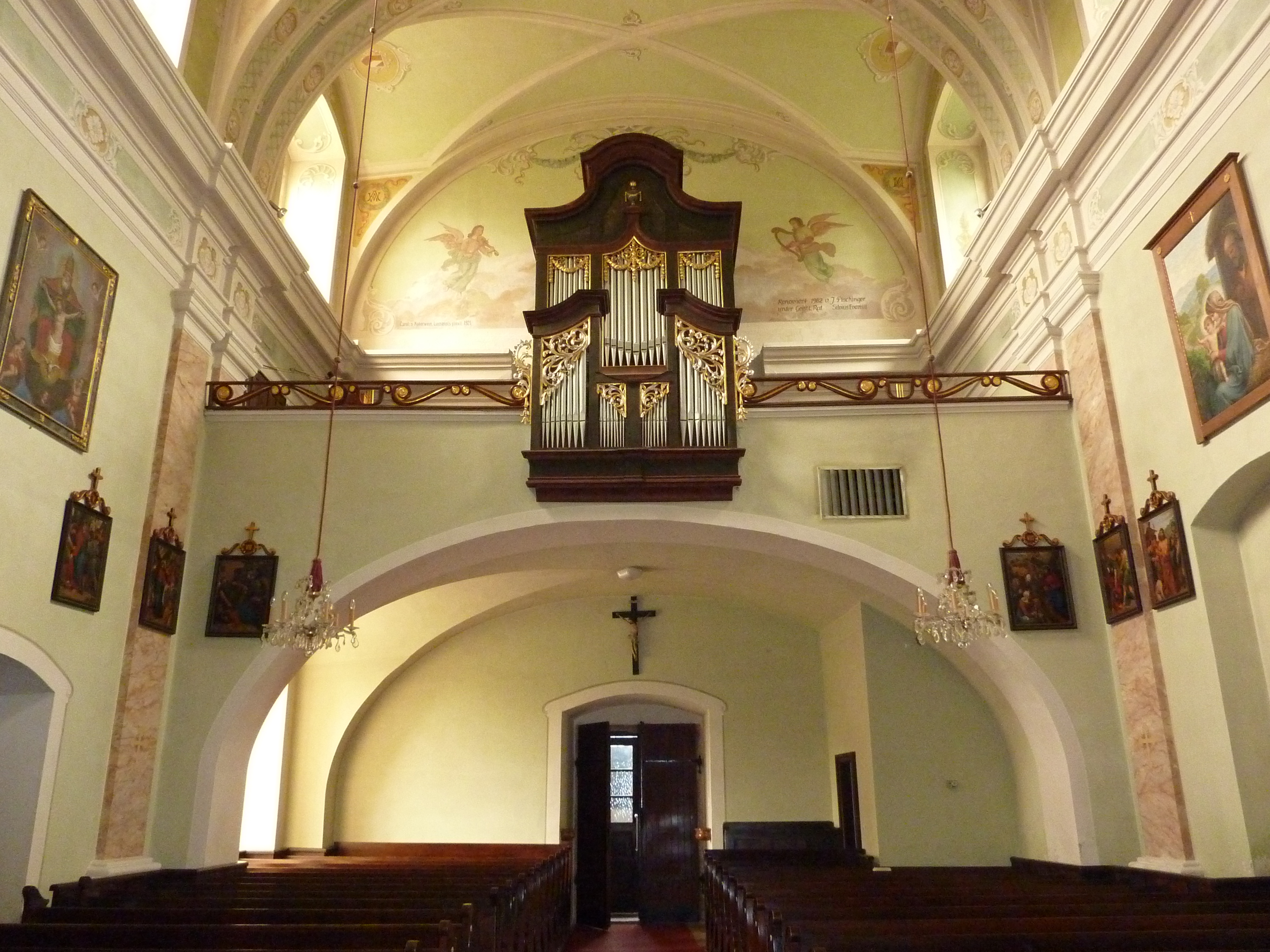 Pfarrkirche, Pisching (KG Wimberg), Yspertal, Niederösterreich - Orgel von Franz Capek 1915 (Rückpositiv von der alten Orgel 1841)